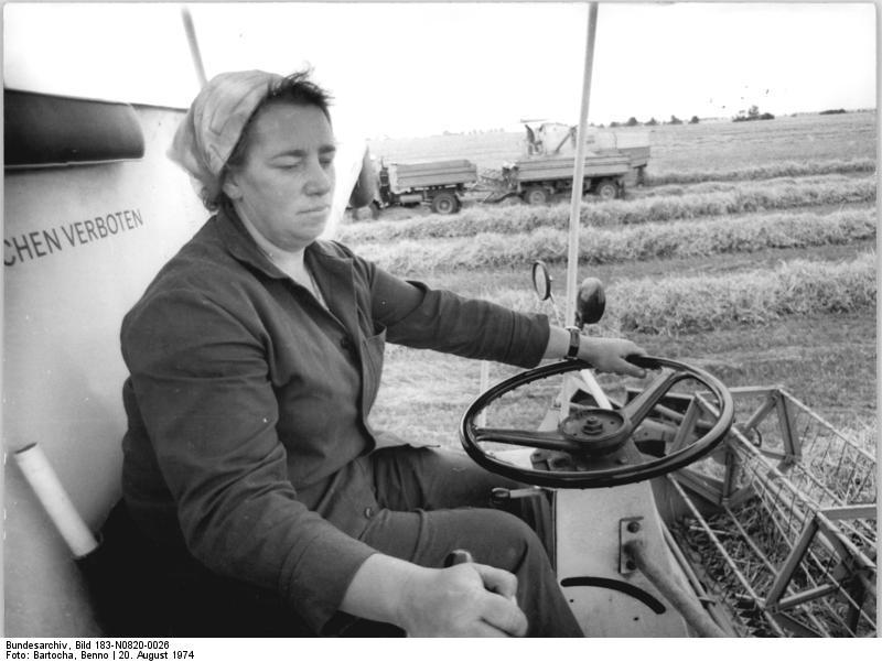 KAP Bartow, Mähdrescherfahrerin, Ernte ADN-ZB Bartocha 20.8.74-wa-Bez. Neubrandenburg: Magdalena Radtke gehört zu jenen sieben Frauen der KAP Bartow im Kreis Altentreptow, die sich in den Wintermonaten zum Mähdrescherkapitän qualifizierten. Insgesamt neuen Frauen lösen sich bei der Schichtarbeit auf den E 512 ab.